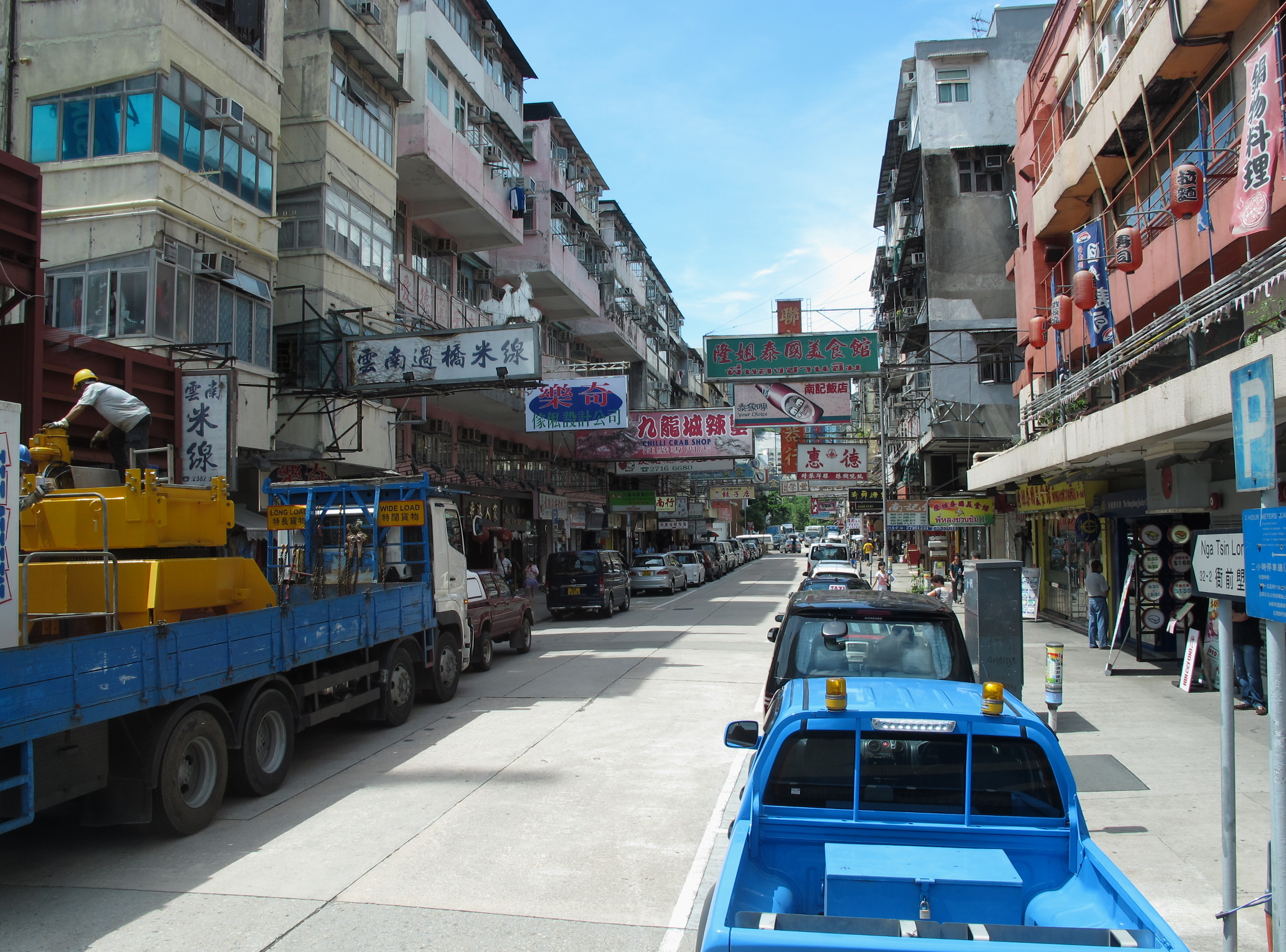 Nga Tsin Long Road 衙前塱道